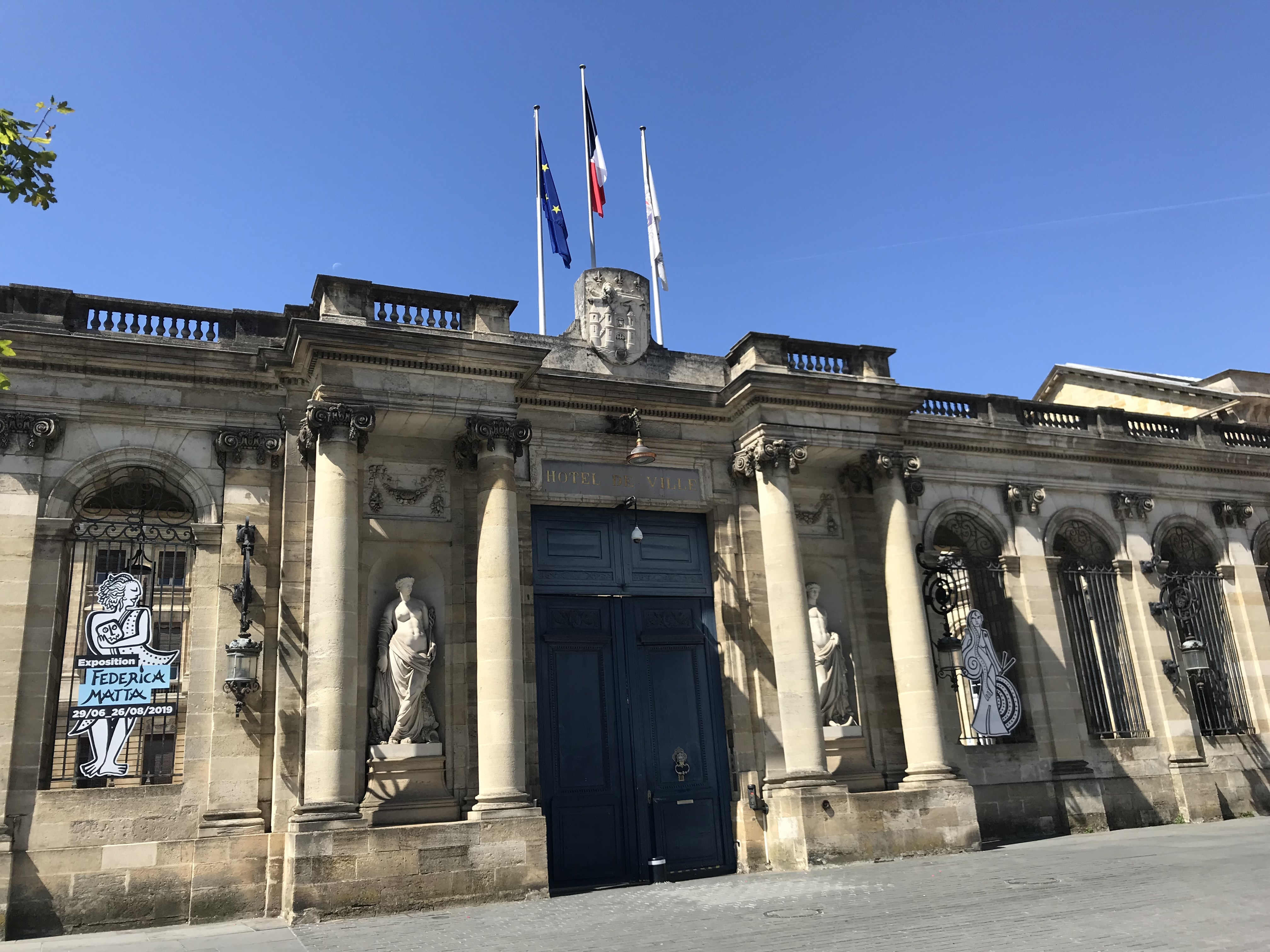 Hôtel de Ville de Bordeaux 2019